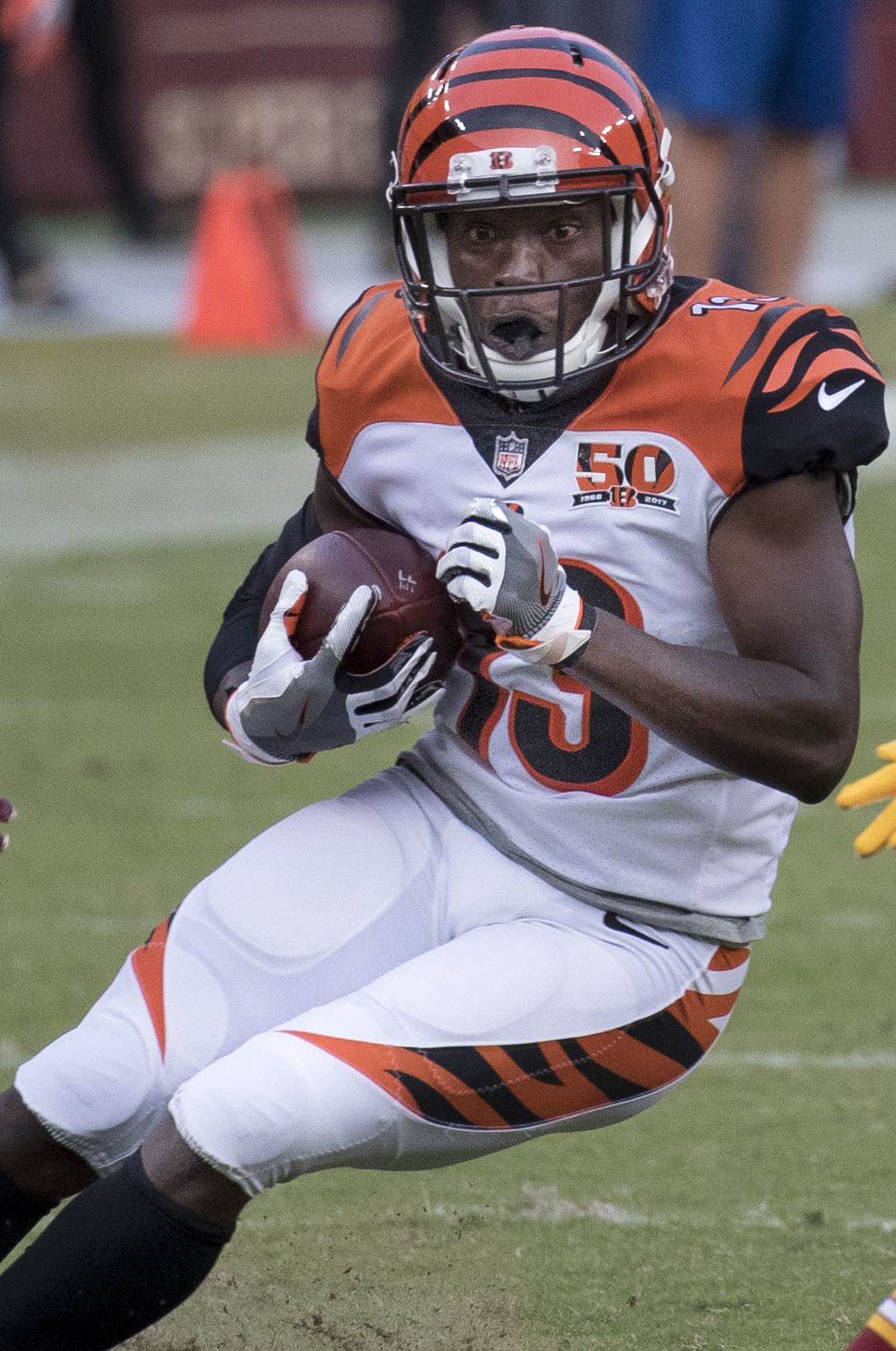 Bengals at Redskins 8/27/17